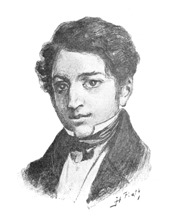 grafika z książki PL